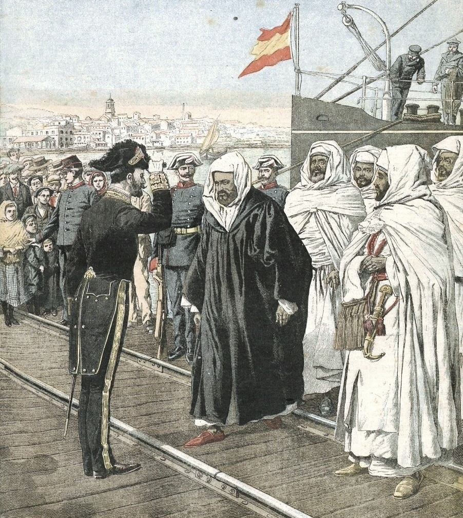 Arrivée des délégués plénipotentiaires marocains (dont Mohammed el Mokri) à la Conférence d'Algésiras.